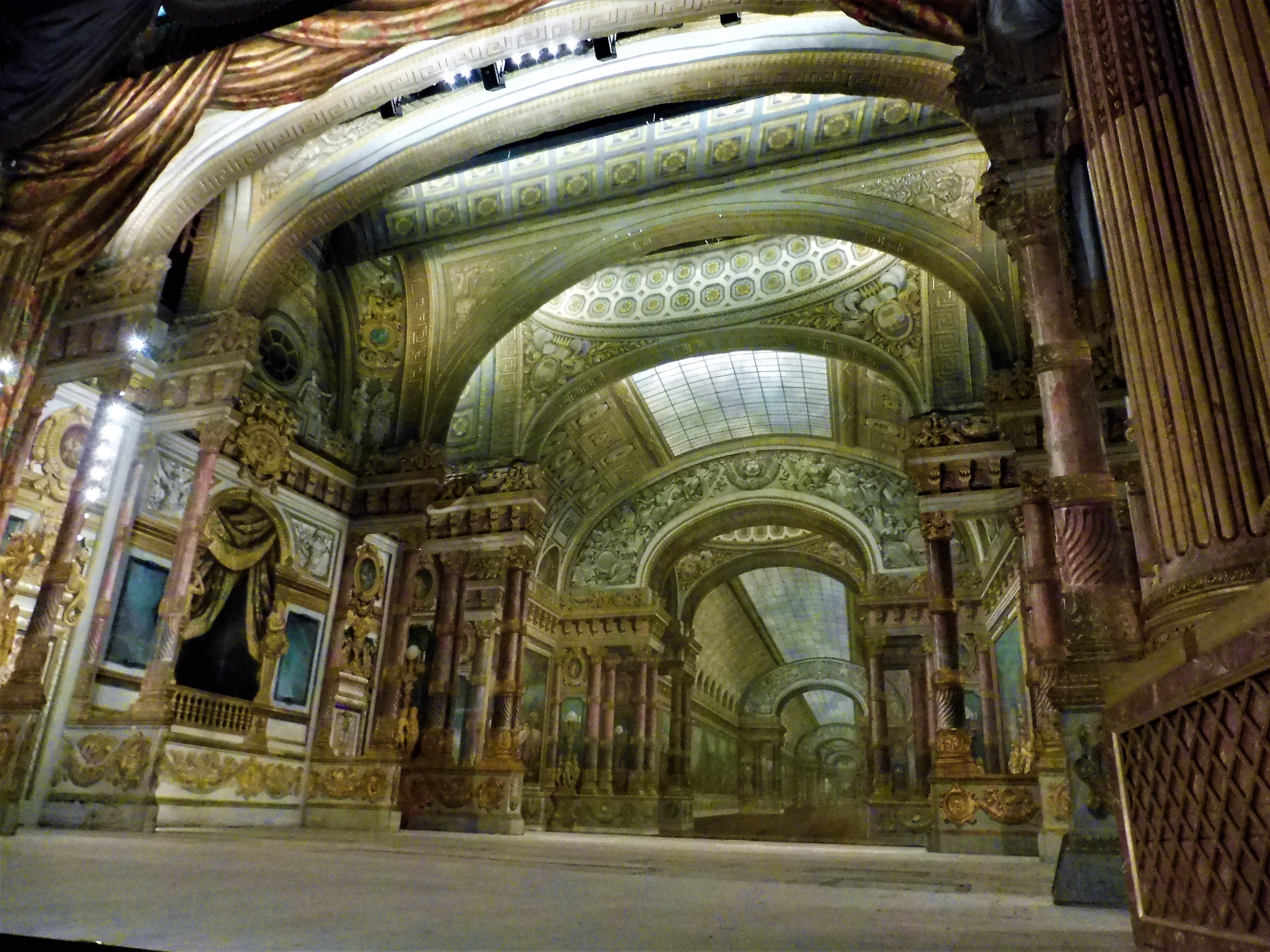 Scène de l'opéra royal du château de Versailles